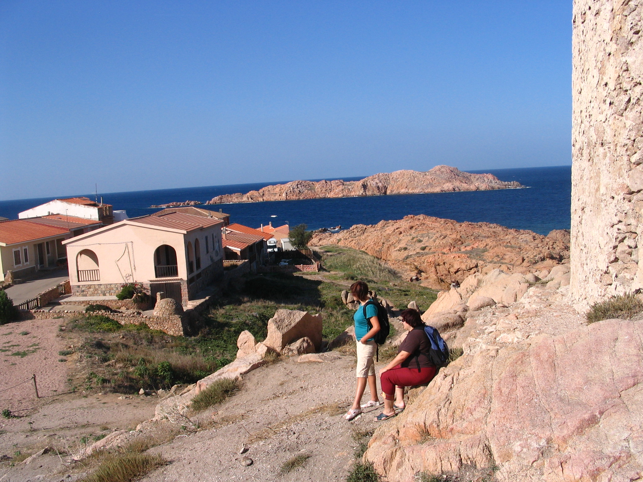 Rocks near Village Isola Rossa in Sardinia